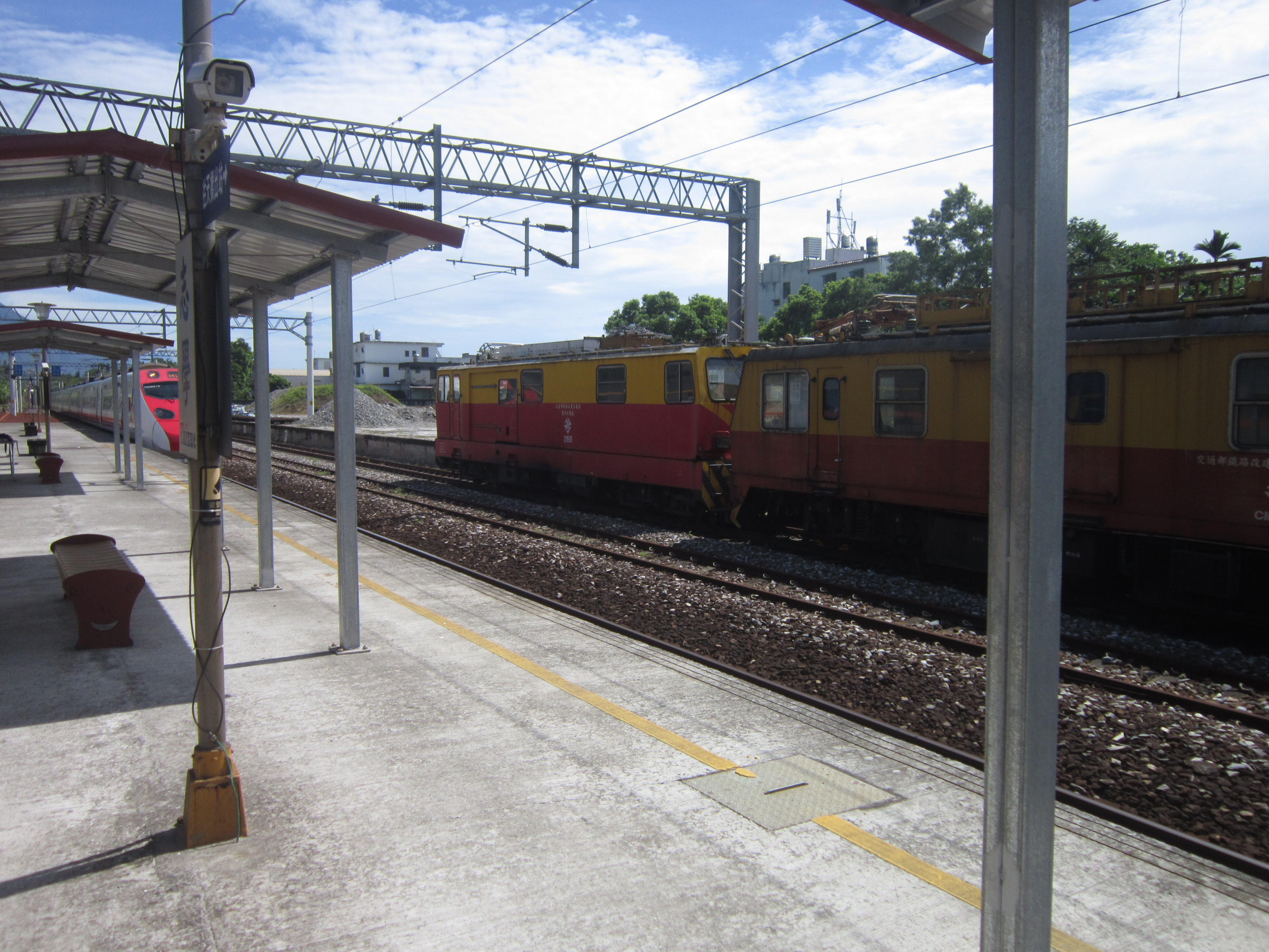 施工中志學車站月台上的臨時遮雨棚，交通部鐵路改建工程局東部工程處電車線維修車及一列過站的普悠瑪列車